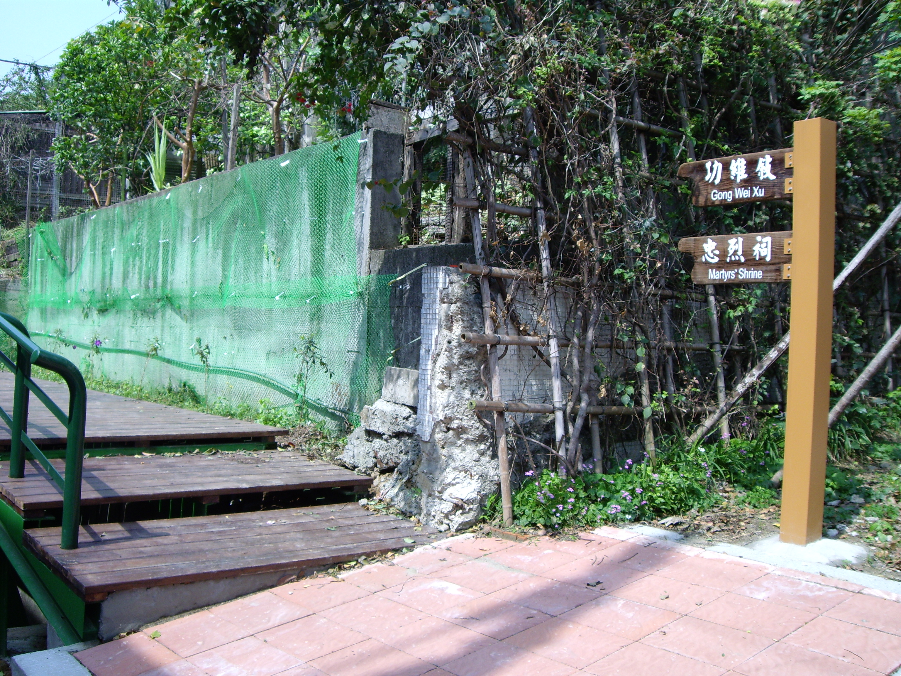 台鐵苗栗市舊苗栗隧道功維敘新入口，位於苗栗市大同里活動中心後面。